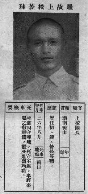 抗戰軍人忠烈錄第一輯中的烈士遺像